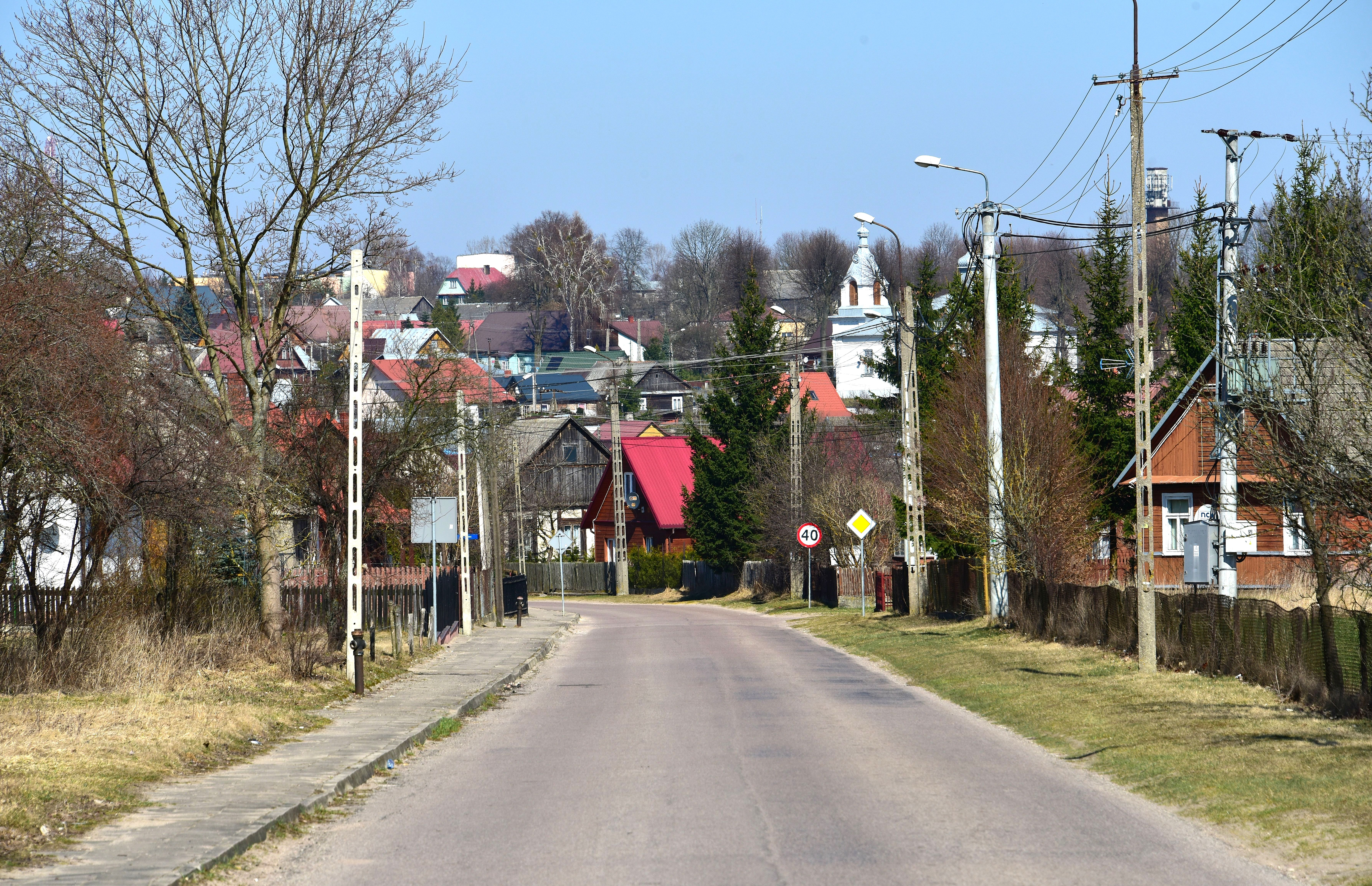 Krynki widziane od strony Kruszynian